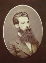 Mantilla de Joven